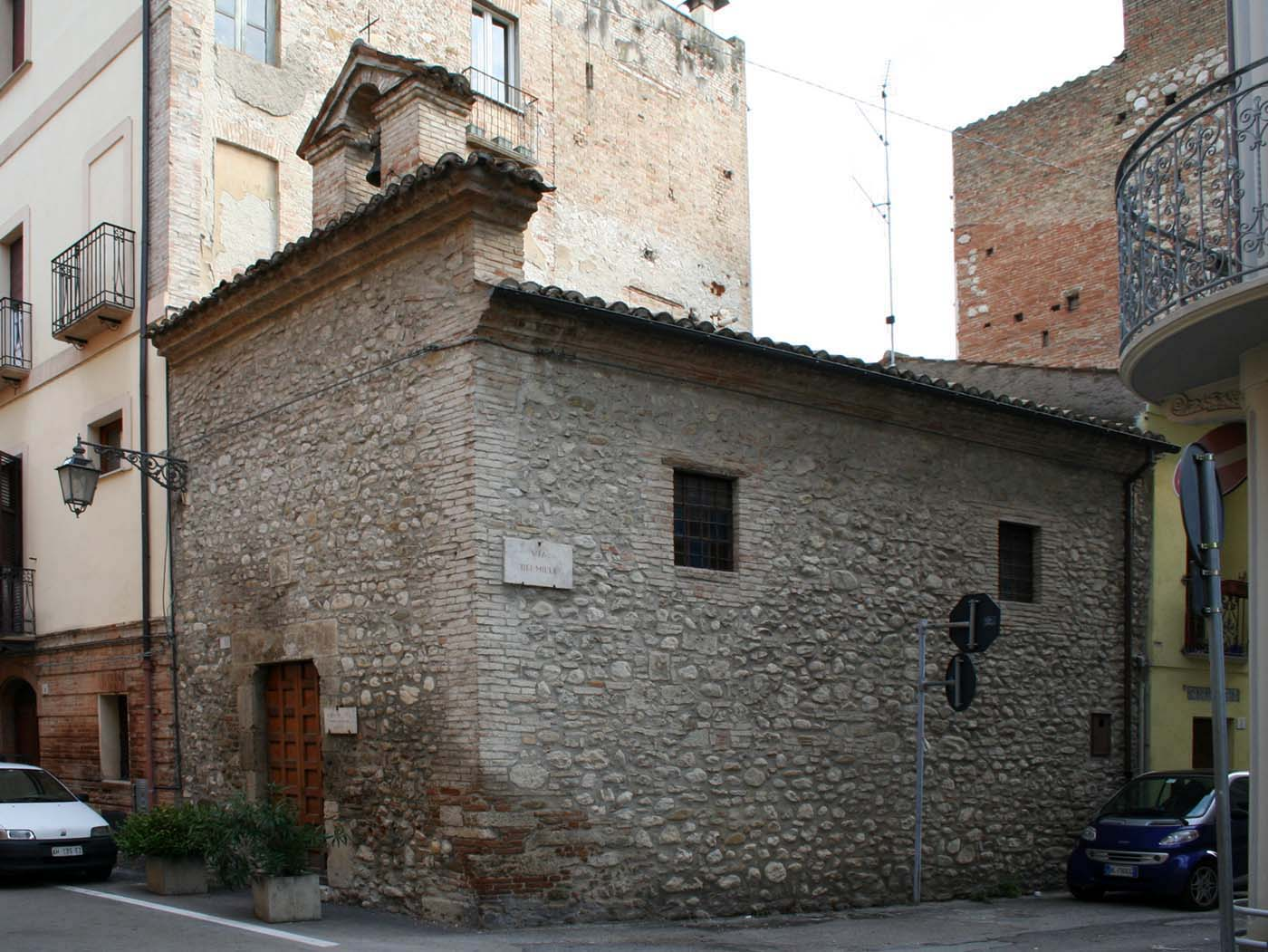 Chiesa di San Luca nella città di Teramo, esterno giorno